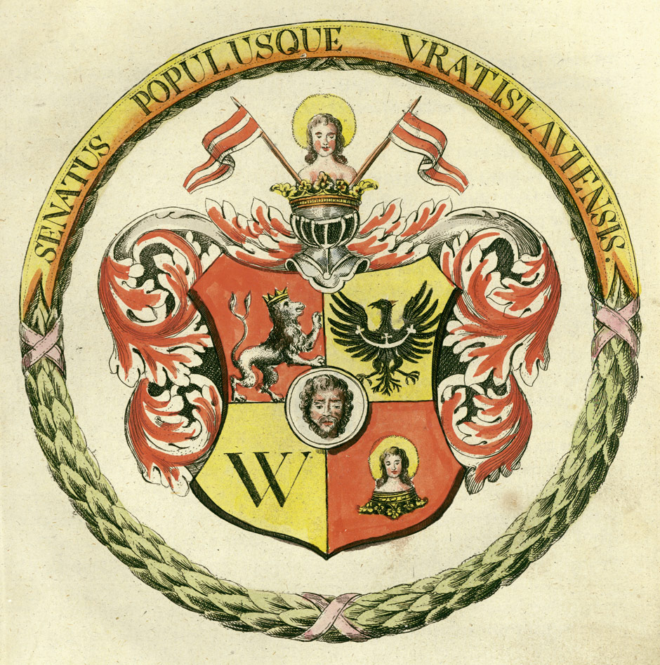 Breslauer Wappen, aus: Carl Adolph Menzel: Topographische Chronik von Breslau, Breslau, Graß und Barth, 1805-07